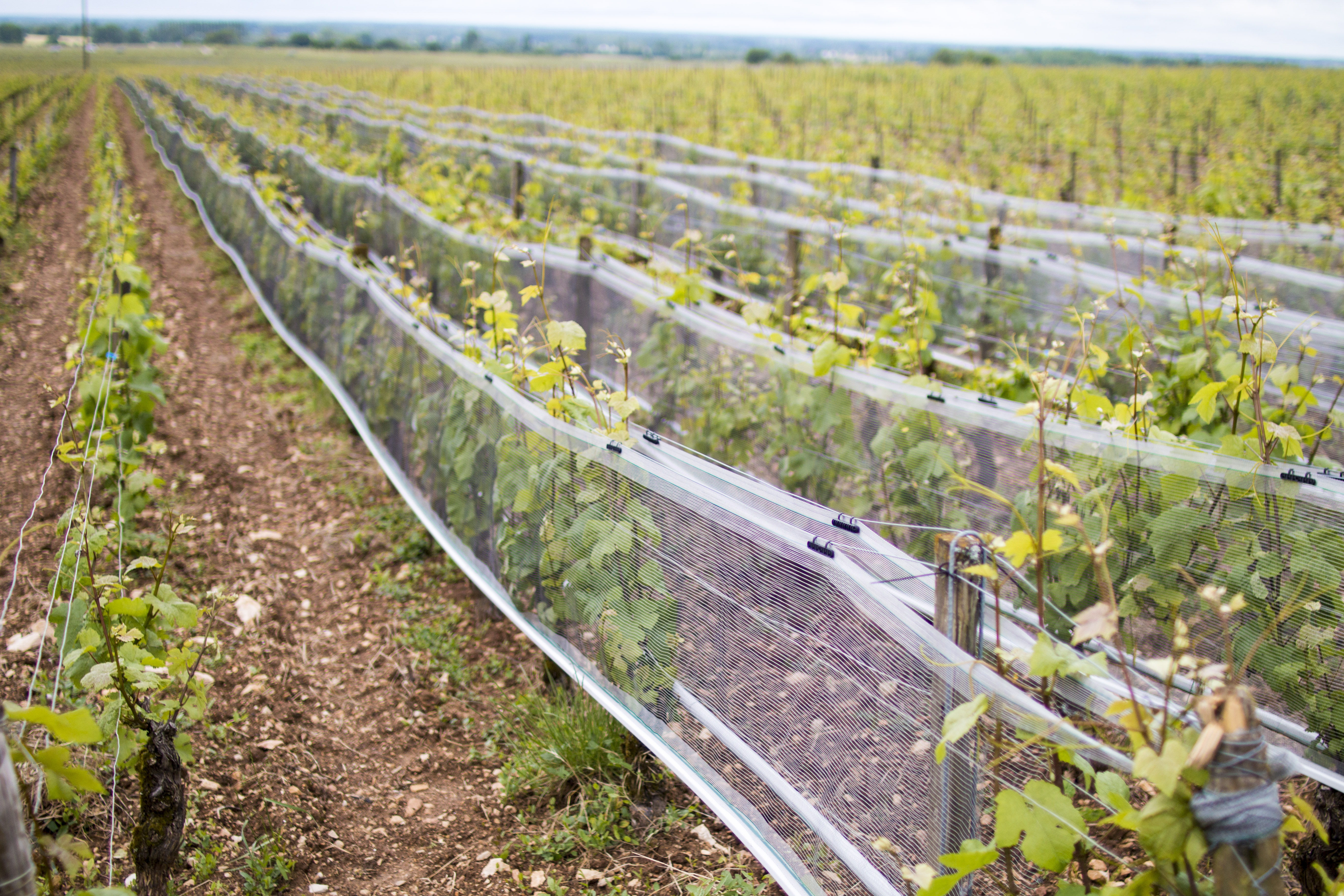 Hagelschutznetze auf Rebzeilen im Burgund